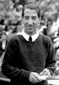 Das grosse Tennismatch Deutschland-Frankreich fand vor 6000 Zuschauern im Blau-weiss-Tennis-Stadion in Berlin-Dahlem statt. Sieger wurde der Weltmeister Lacoste über den deutschen Alt-Tennismeister Froitzheim.